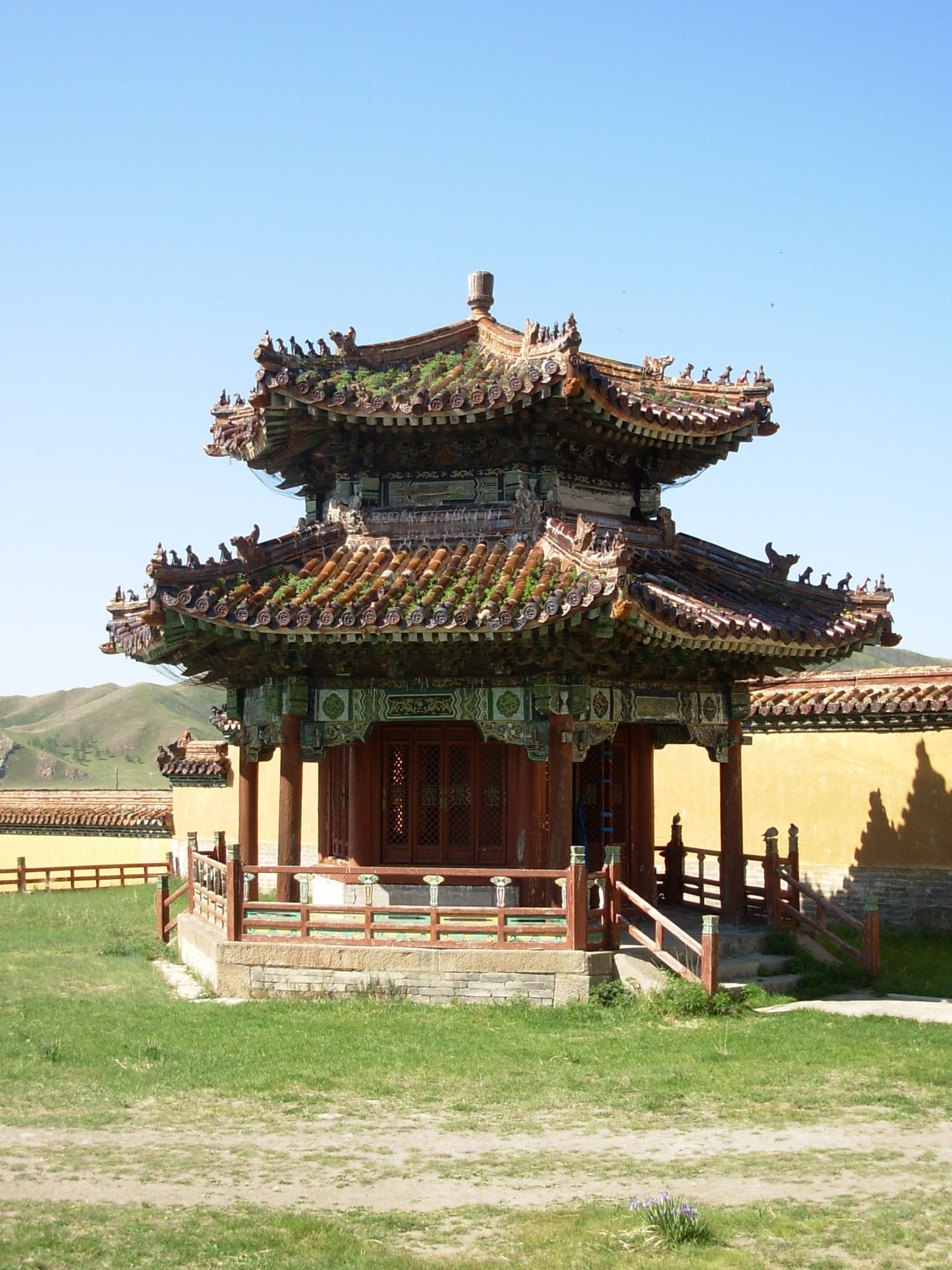 Amarbayasgalant Khiid